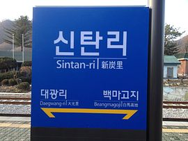 신탄리역 역명판